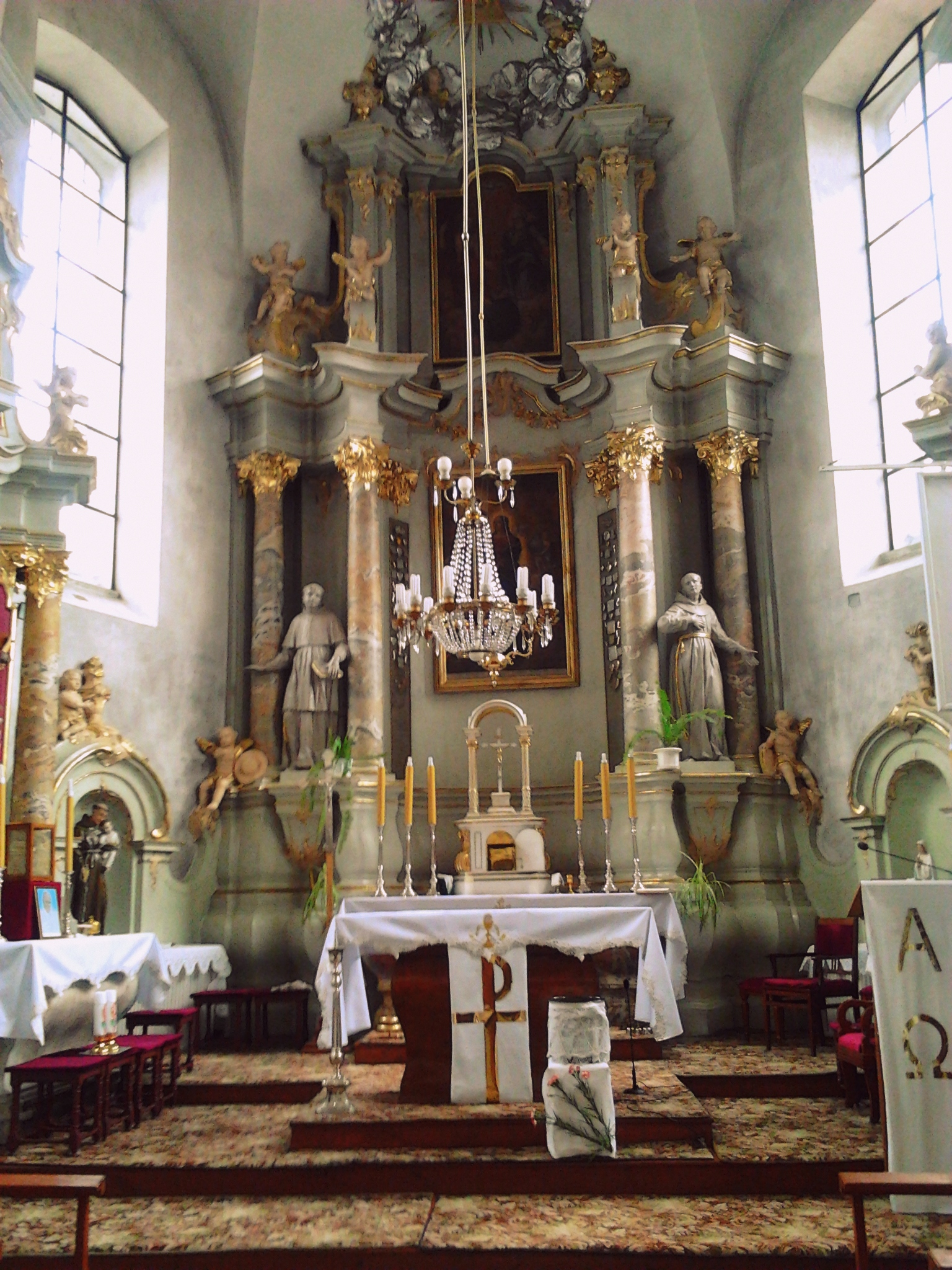 Беларуская (тарашкевіца): Ансамбаль Андрэеўскага касьцёлу:касьцёлжылы корпусбрама з агароджай. г. Слонім This is a photo of Belarusian heritage monument. Reference number: 412Г000498 ( WLM)